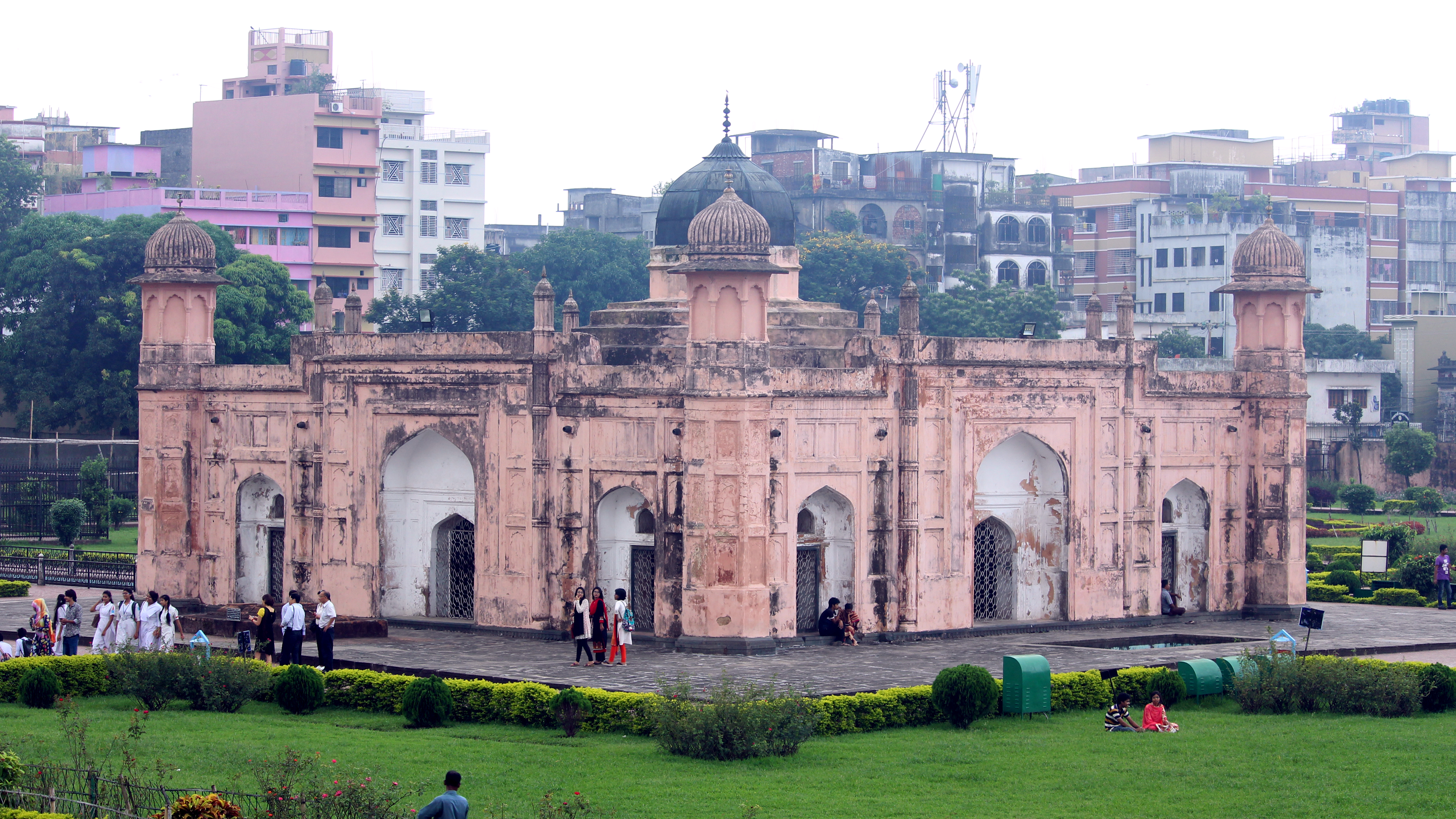 পরিবিবির মাজার